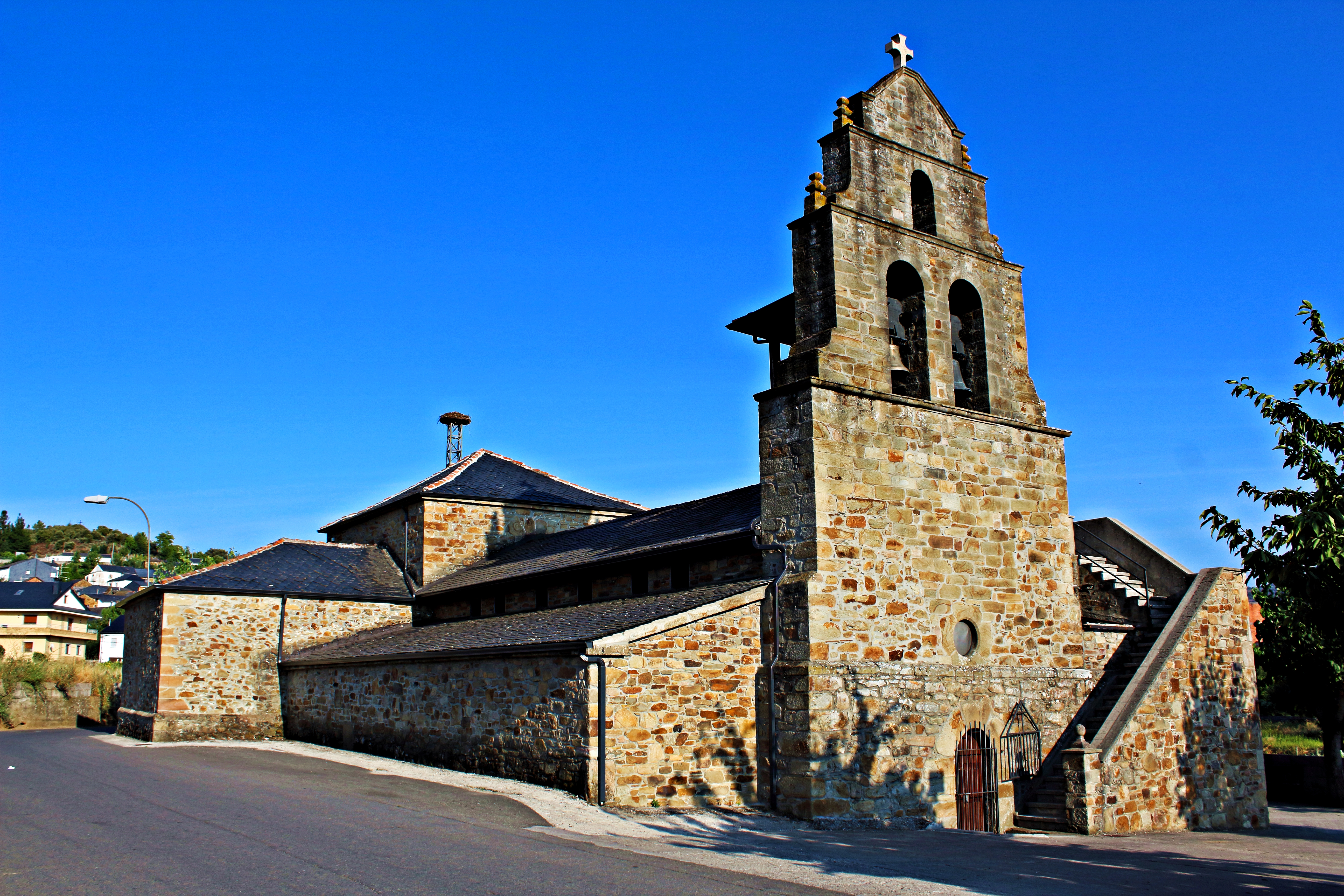 Lillo, localidad del municipio de Fabero, comarca de El Bierzo, provincia de León.